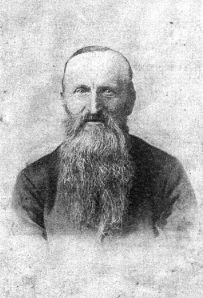 Porträt Julius August Lencer